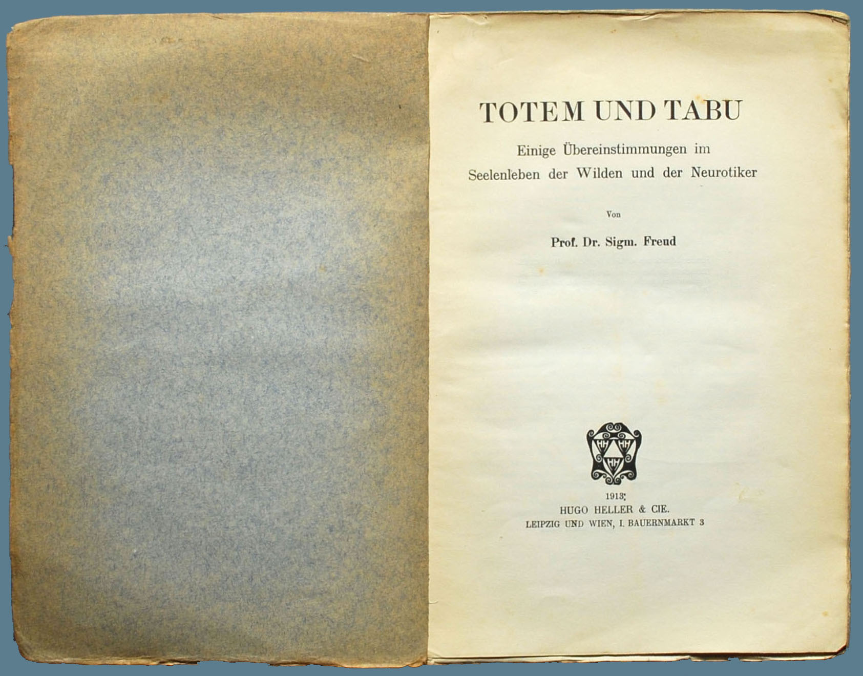 Freud, Sigmund: Totem und Tabu. Quelle:Sammlung H.-P.Haack. Urheber:© Foto H.-P.Haack Das Foto darf gebührenfrei verwendet werden, sofern der Urheber mit „Foto H.-P.Haack“ vermerkt wird